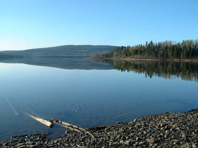 Grand lac Touladi, sur le territoire du futur parc national du Lac-Témiscouata, dans le Bas-saint-Laurent (Québec)